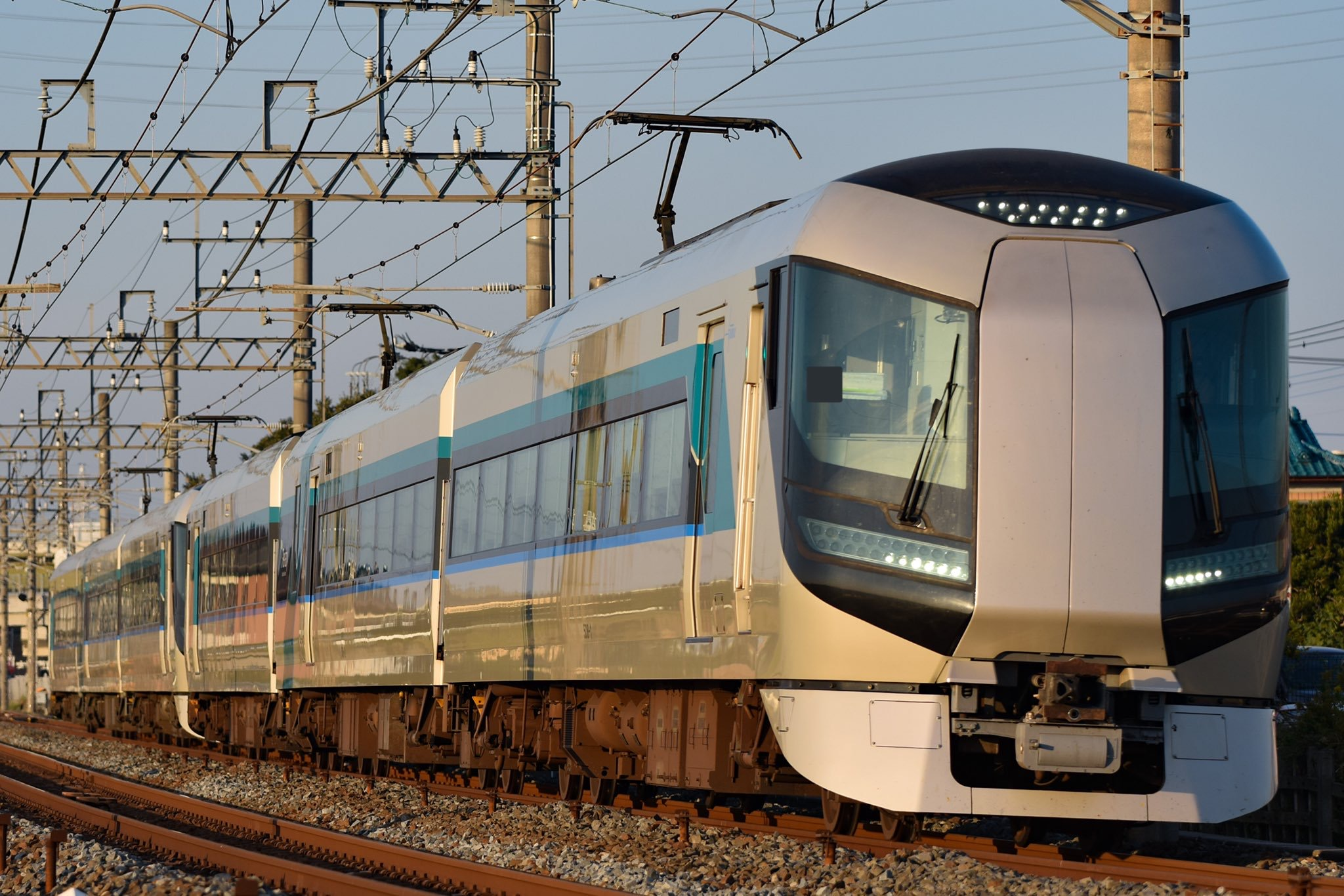 東武500系(リバティ号)